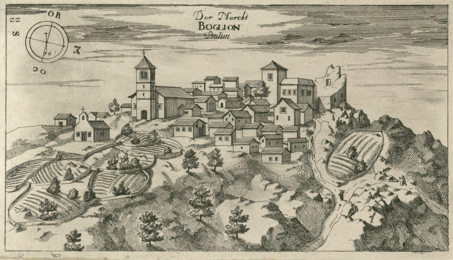 Boljun